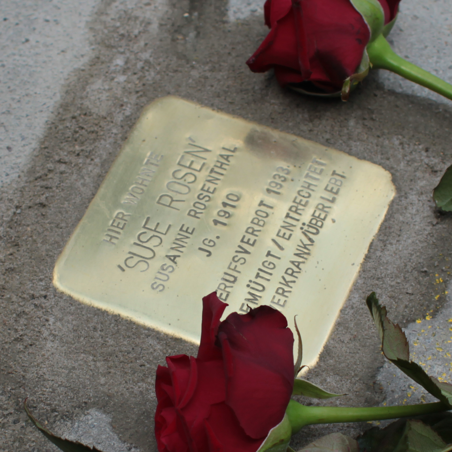 Werastr. 9, verlegt auf Eugenstaffel